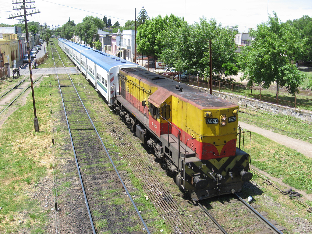 Locomotora EMD GR-12 A628 dirigiéndose hacia Plaza Constitución